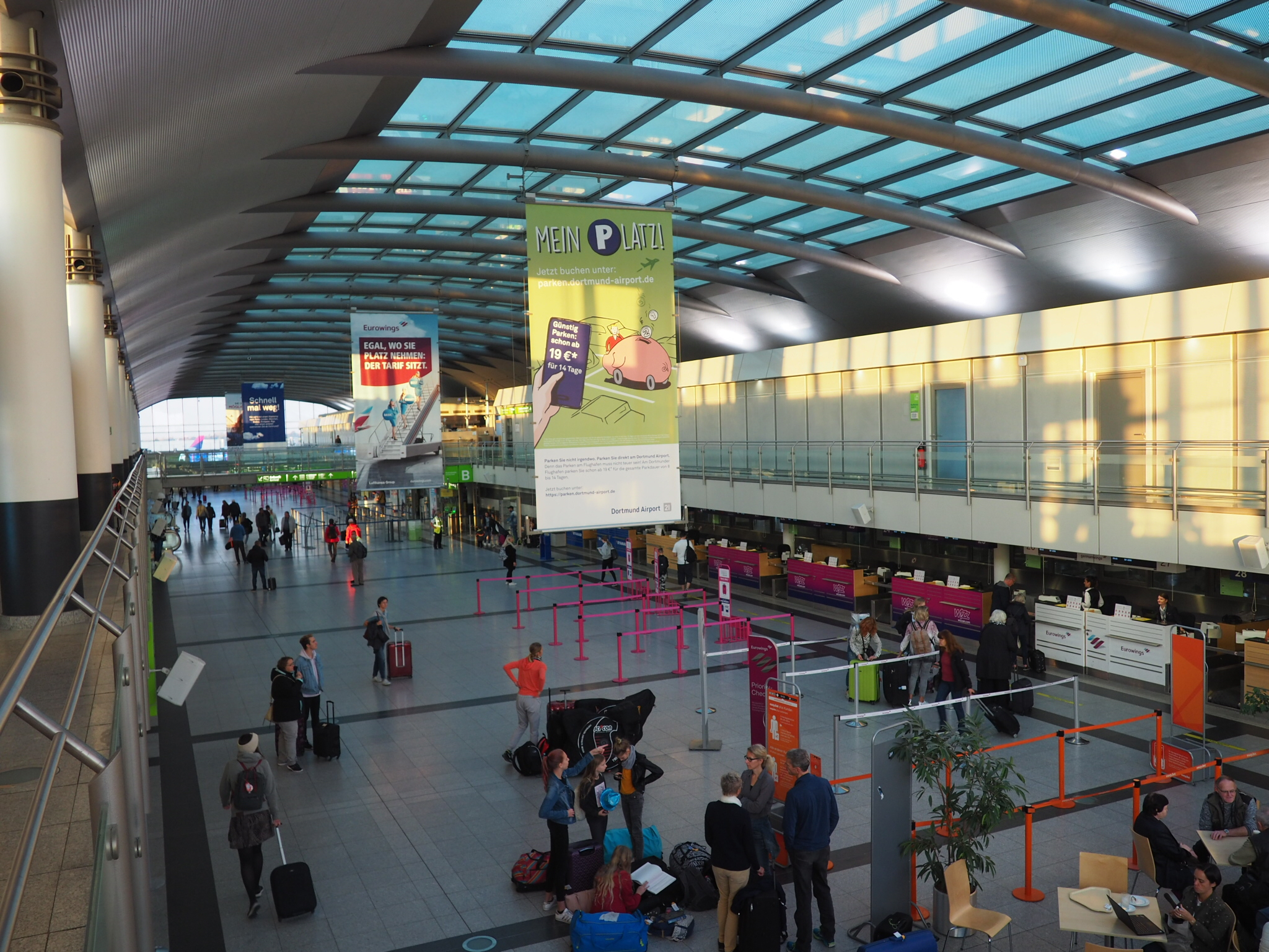 Abflughalle Flughafen Dortmund